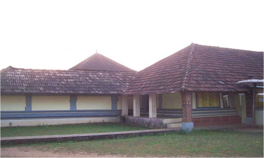 കരിവെള്ളൂർ ശിവക്ഷേത്രം